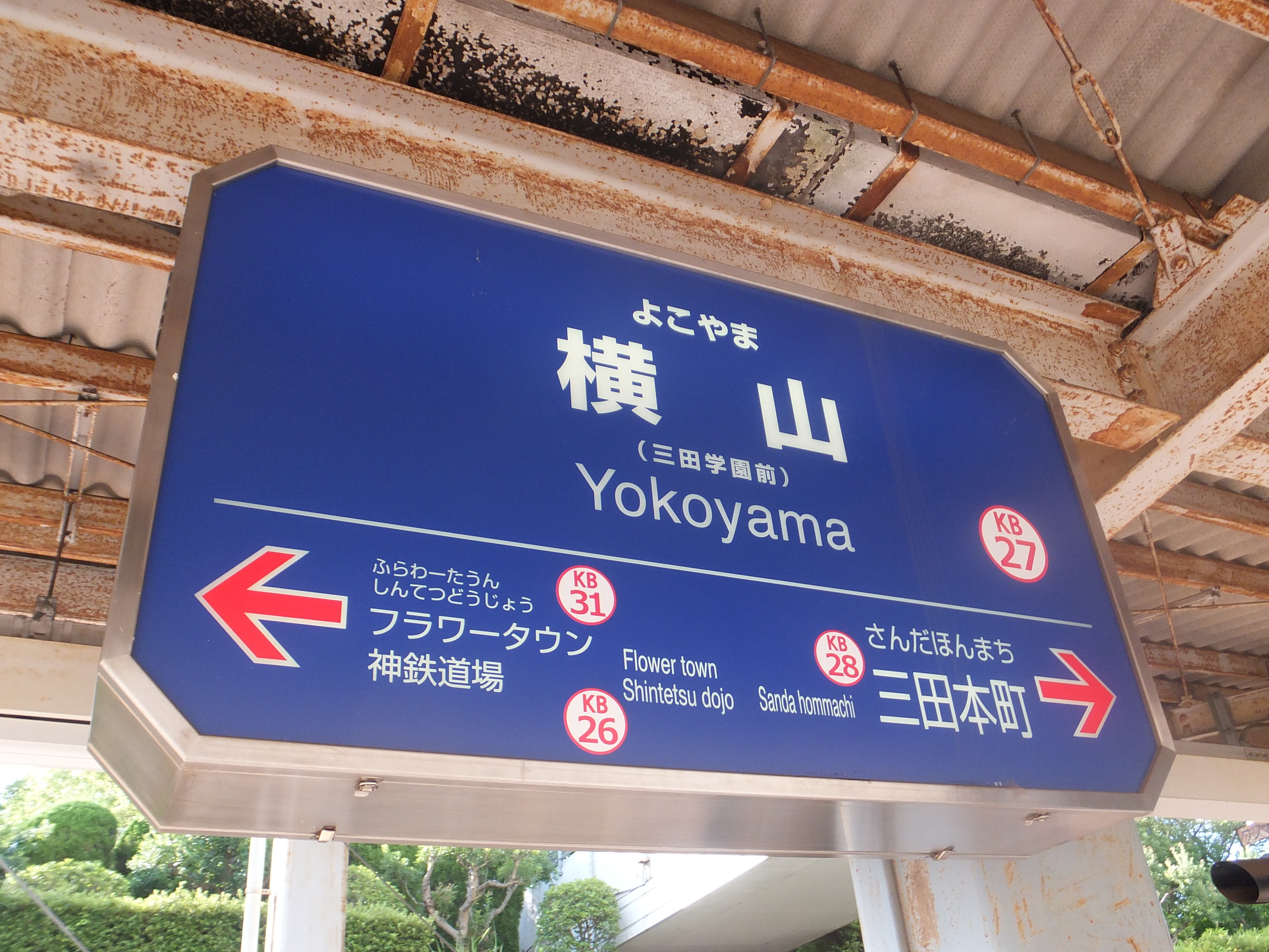 神戸電鉄三田線、横山駅の駅標。